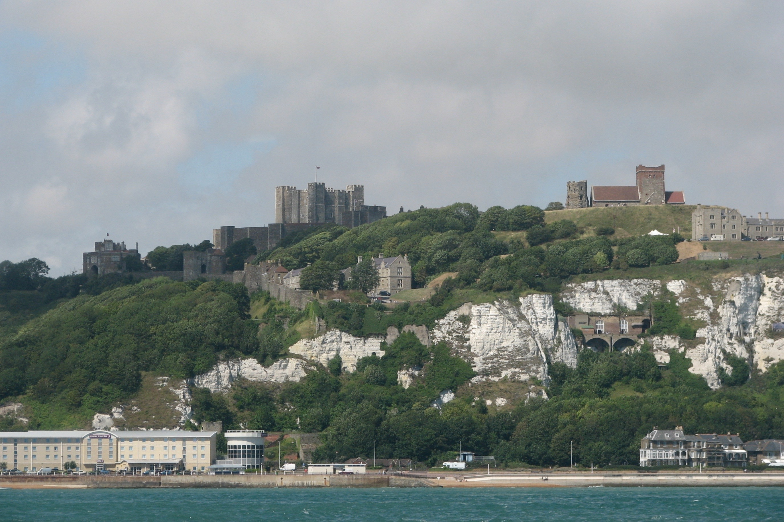 Dover Castle